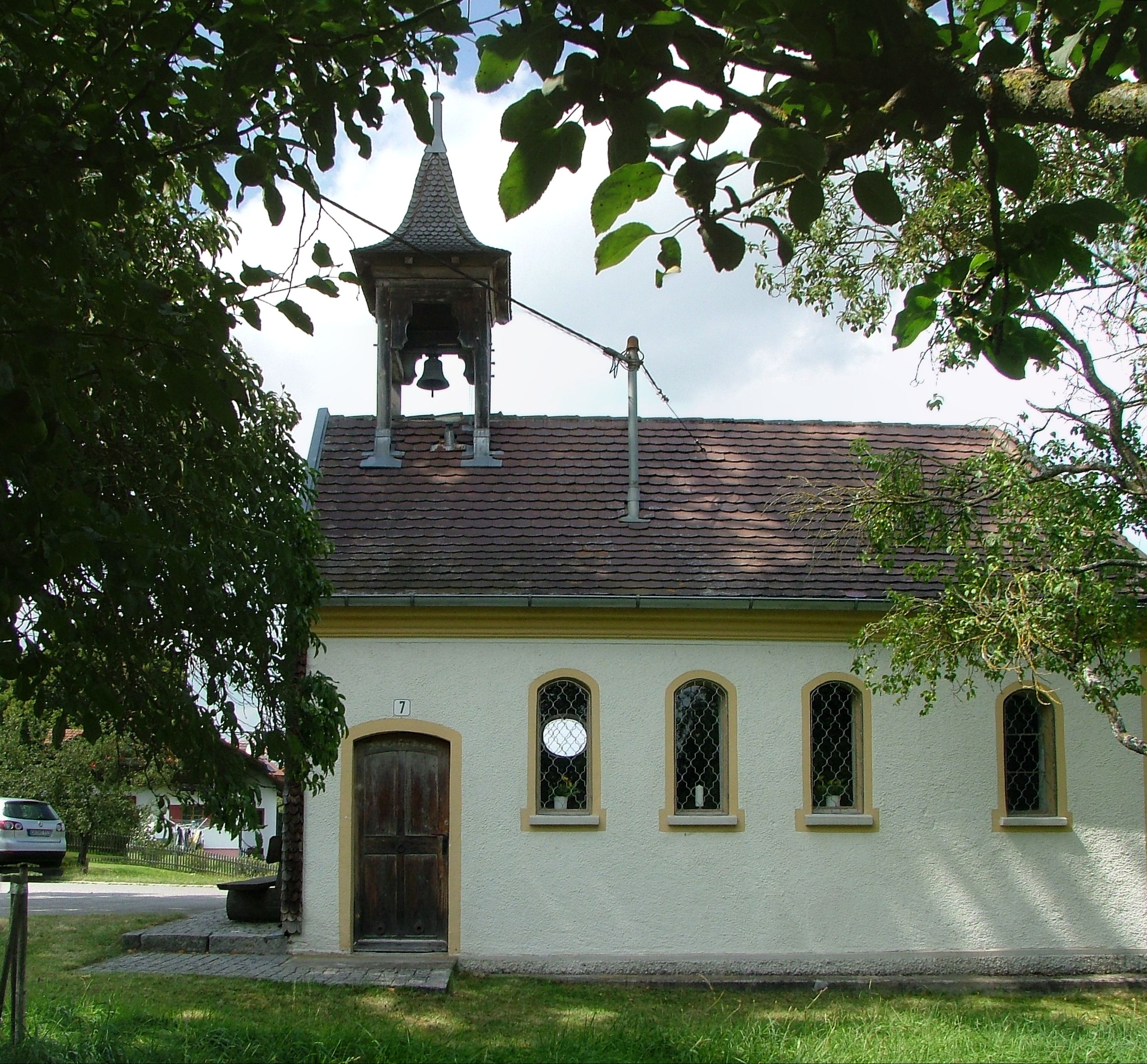 Maria Heimsuchung Depsried